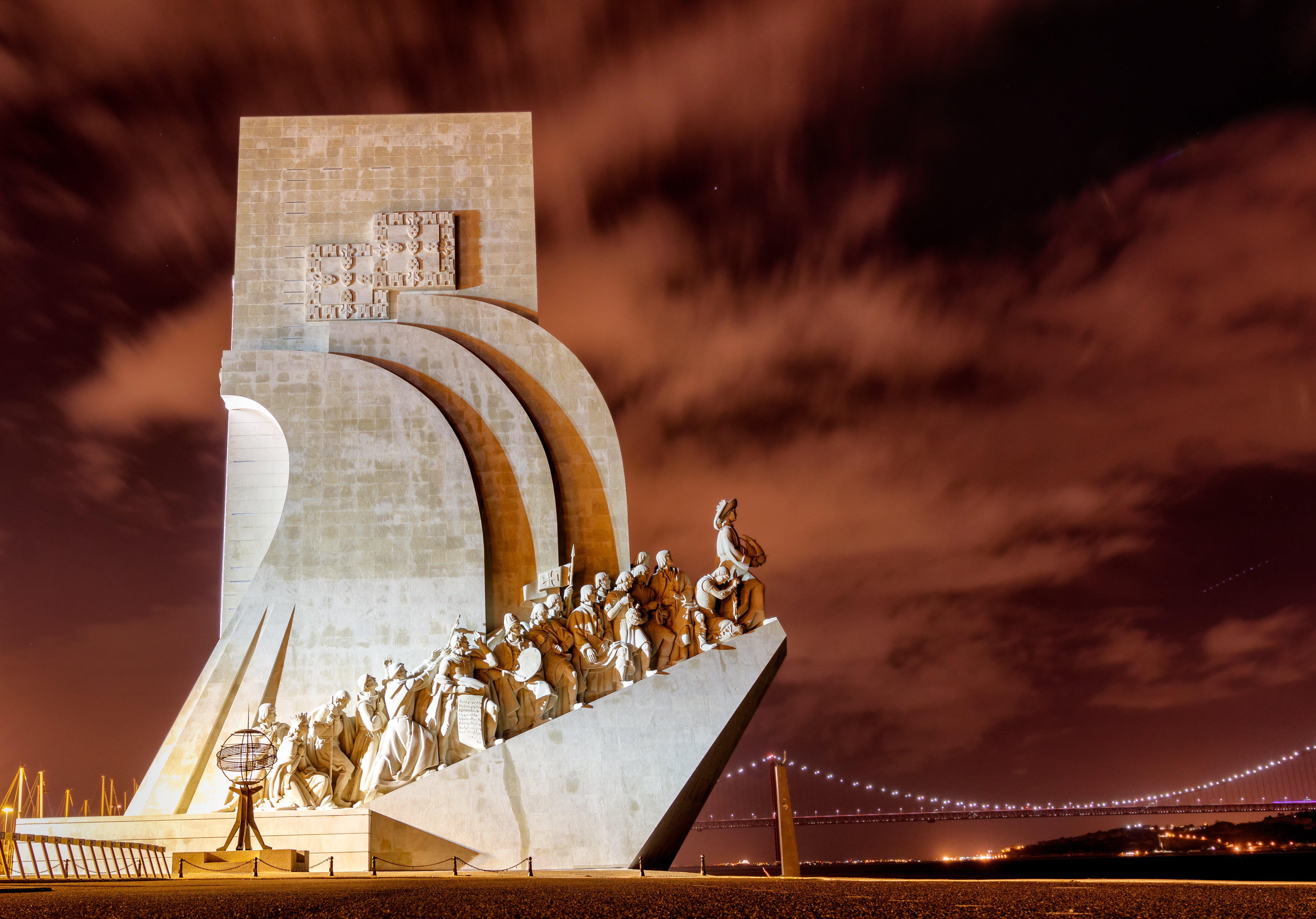 fotografia do Padrão dos Descobrimentos